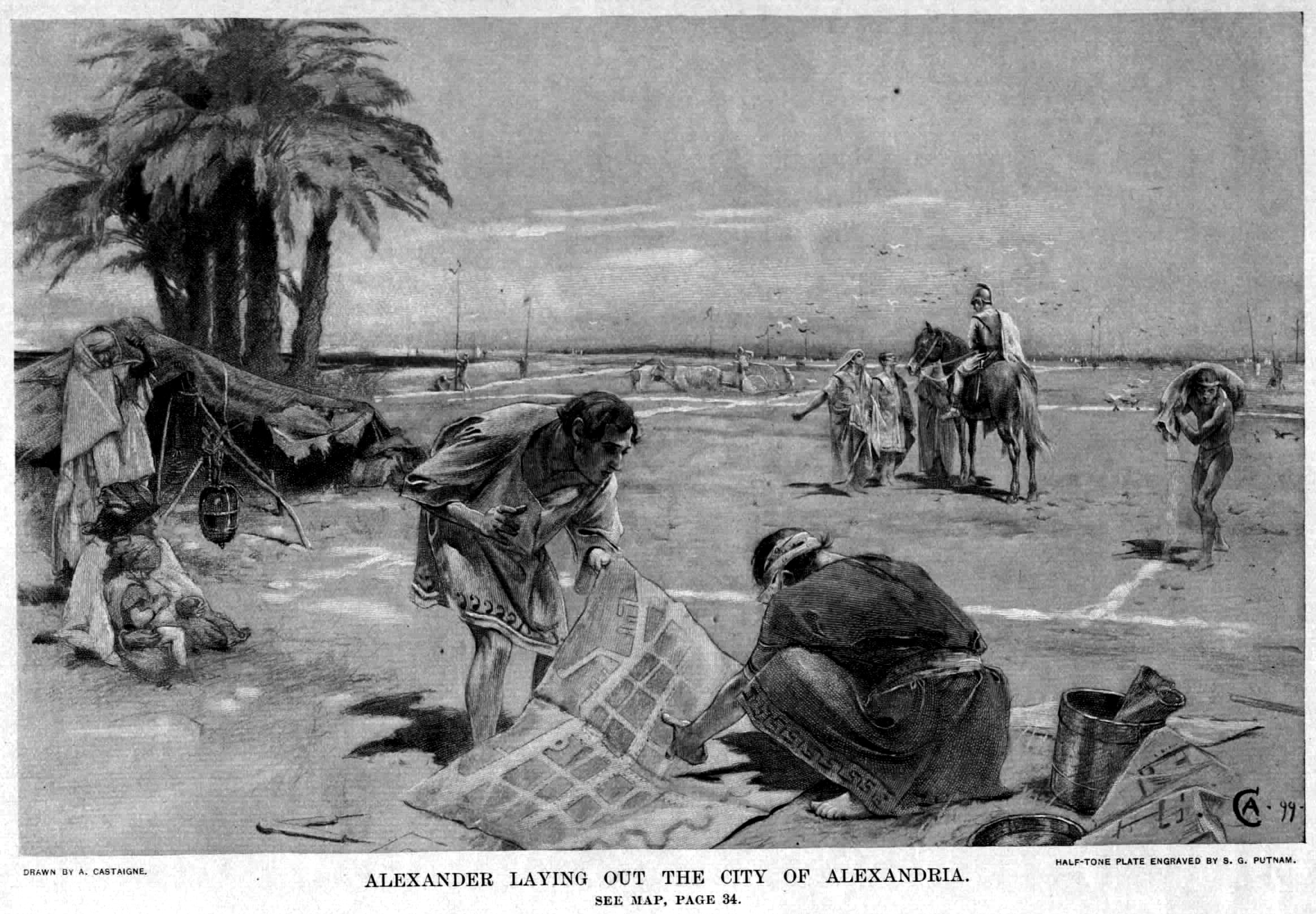 Alexander old drawings